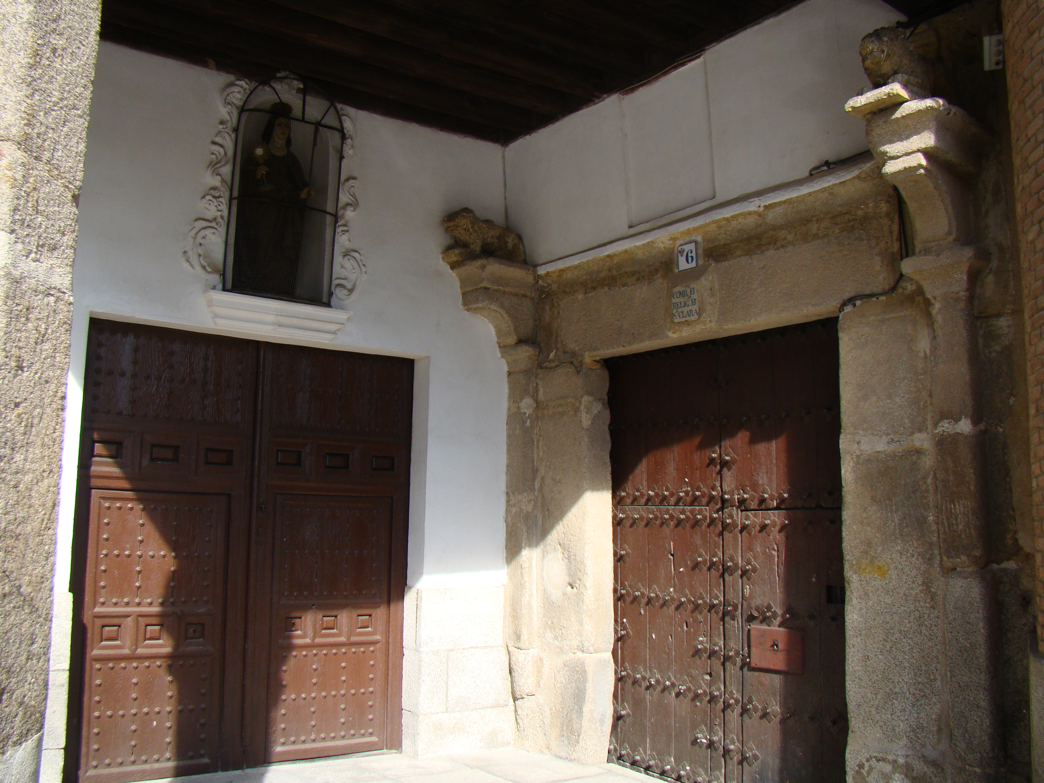 Convento de Santa Clara la Real